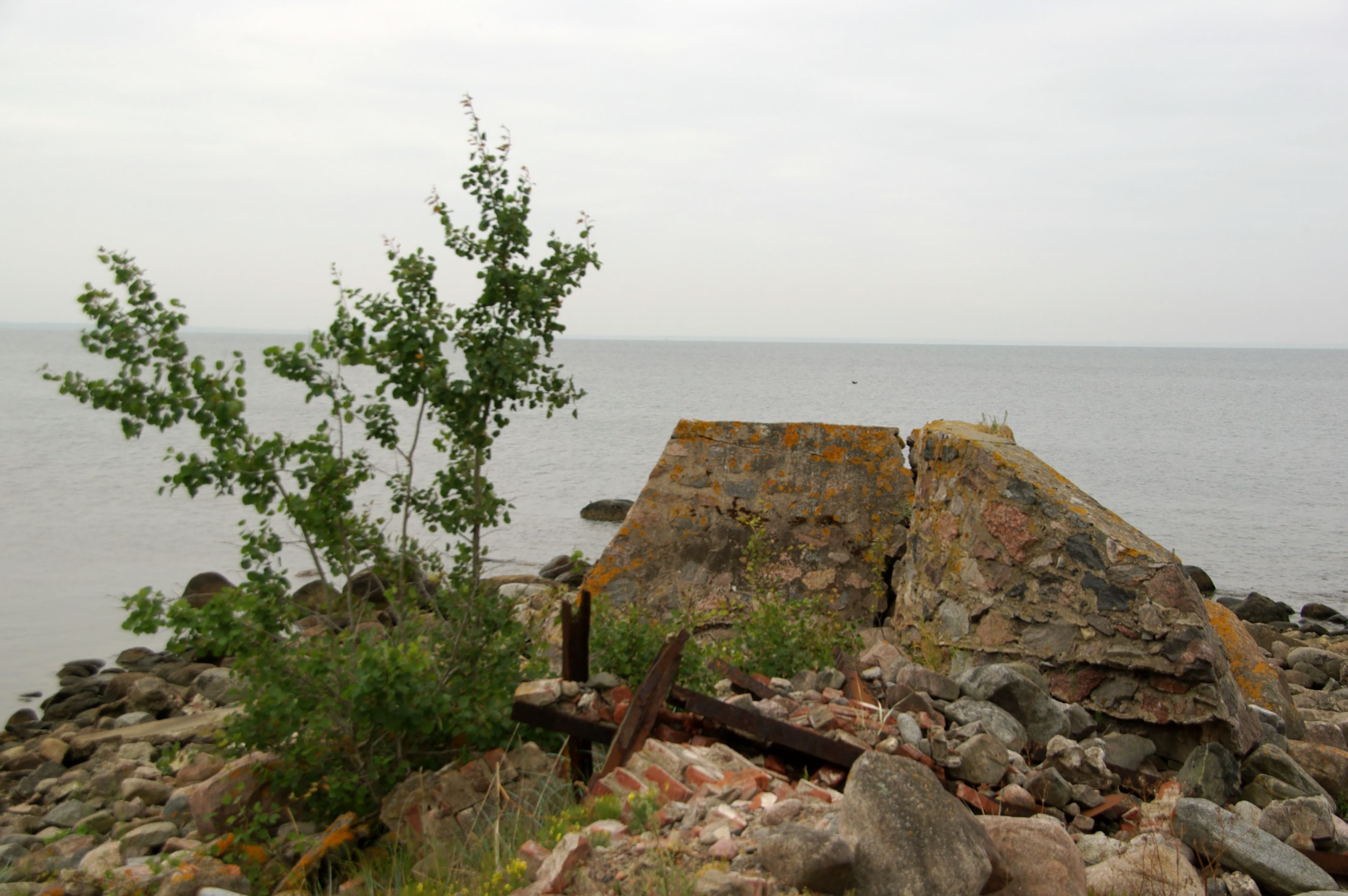 Harju maakond, Tallinna linn, Kesklinna linnaosa Aegna saar